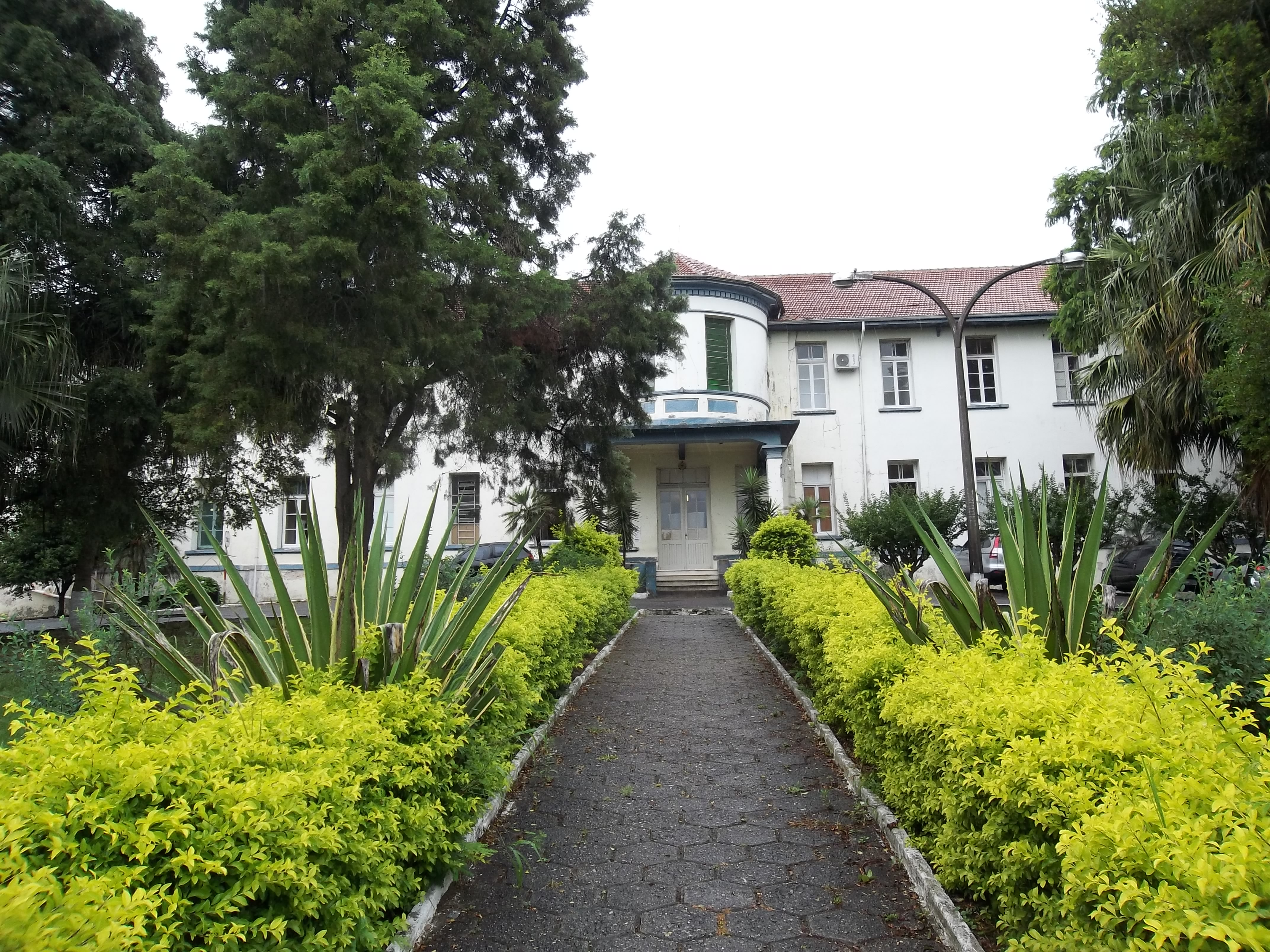 Casa de saúde. NS Perpétuo Socorro, NS Perpétuo Socorro, Sede, Santa Maria, Rio Grande do Sul, Brasil.